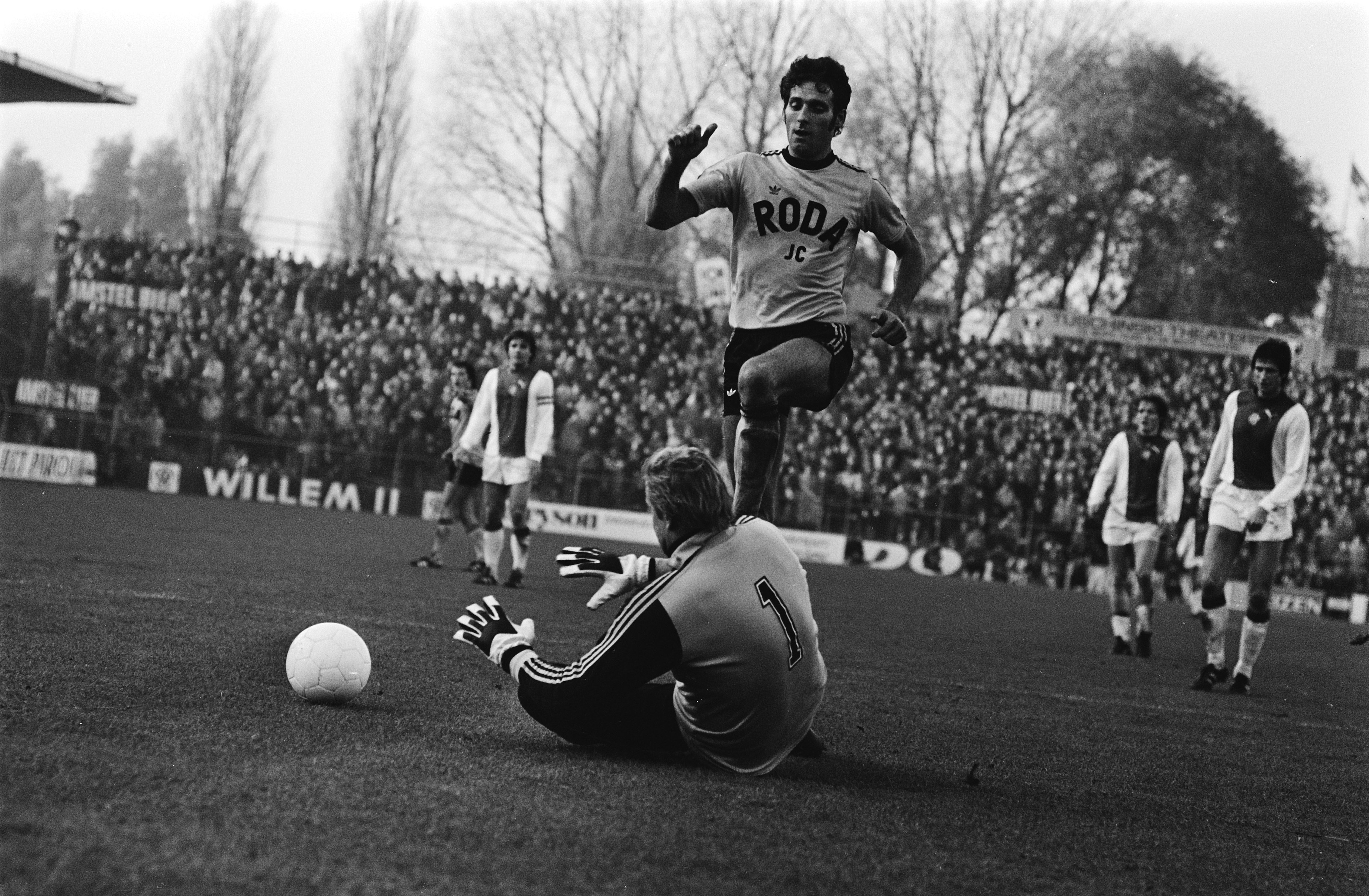 Collectie / Archief : Fotocollectie Anefo Reportage / Serie : [ onbekend ] Beschrijving : Ajax tegen Roda JC 1-2, Dick Nanninga en Piet Schrijvers Datum : 12 november 1978 Trefwoorden : sport, voetbal Persoonsnaam : Nanninga, Dick, Schrijvers, Piet Instellingsnaam : Roda JC Fotograaf : Bogaerts, Rob / Anefo Auteursrechthebbende : Nationaal Archief Materiaalsoort : Negatief (zwart/wit) Nummer archiefinventaris : bekijk toegang 2.24.01.05 Bestanddeelnummer : 929-9904